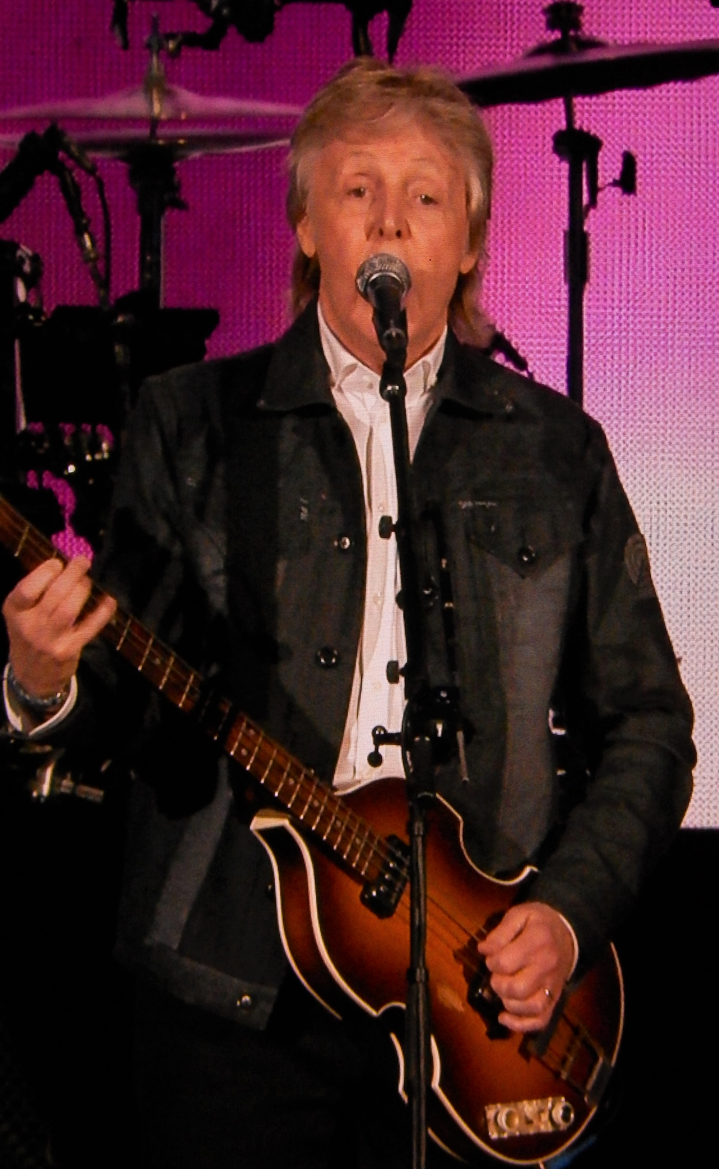 Show de Paul McCartney da turnê Freshen Up, no Allianz Parque, São Paulo Brasil, em 26 de março de 2019.